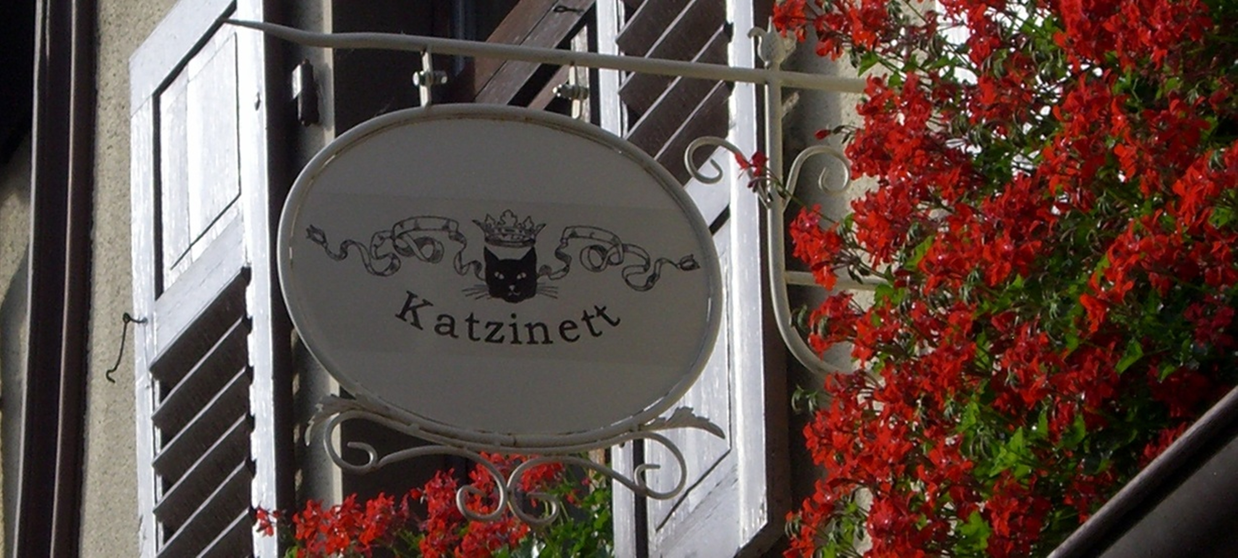 Aushängeschild